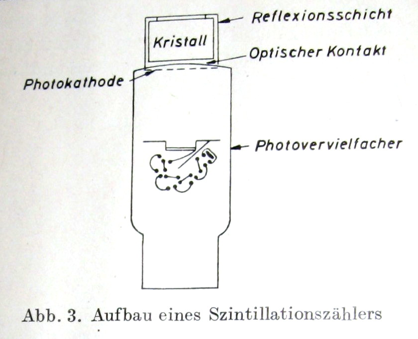 später sogenannter Sekundärelektronendetektor, Beleg für die Erfindung dieses Detektors durch Werner Hartmann